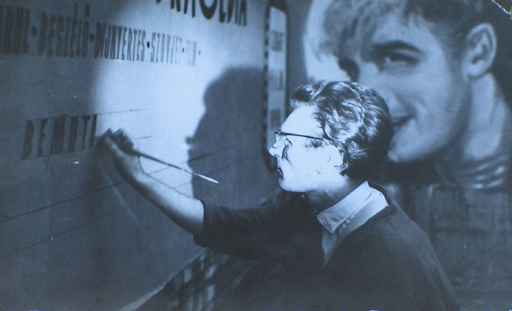 Moziplakát készítése közben